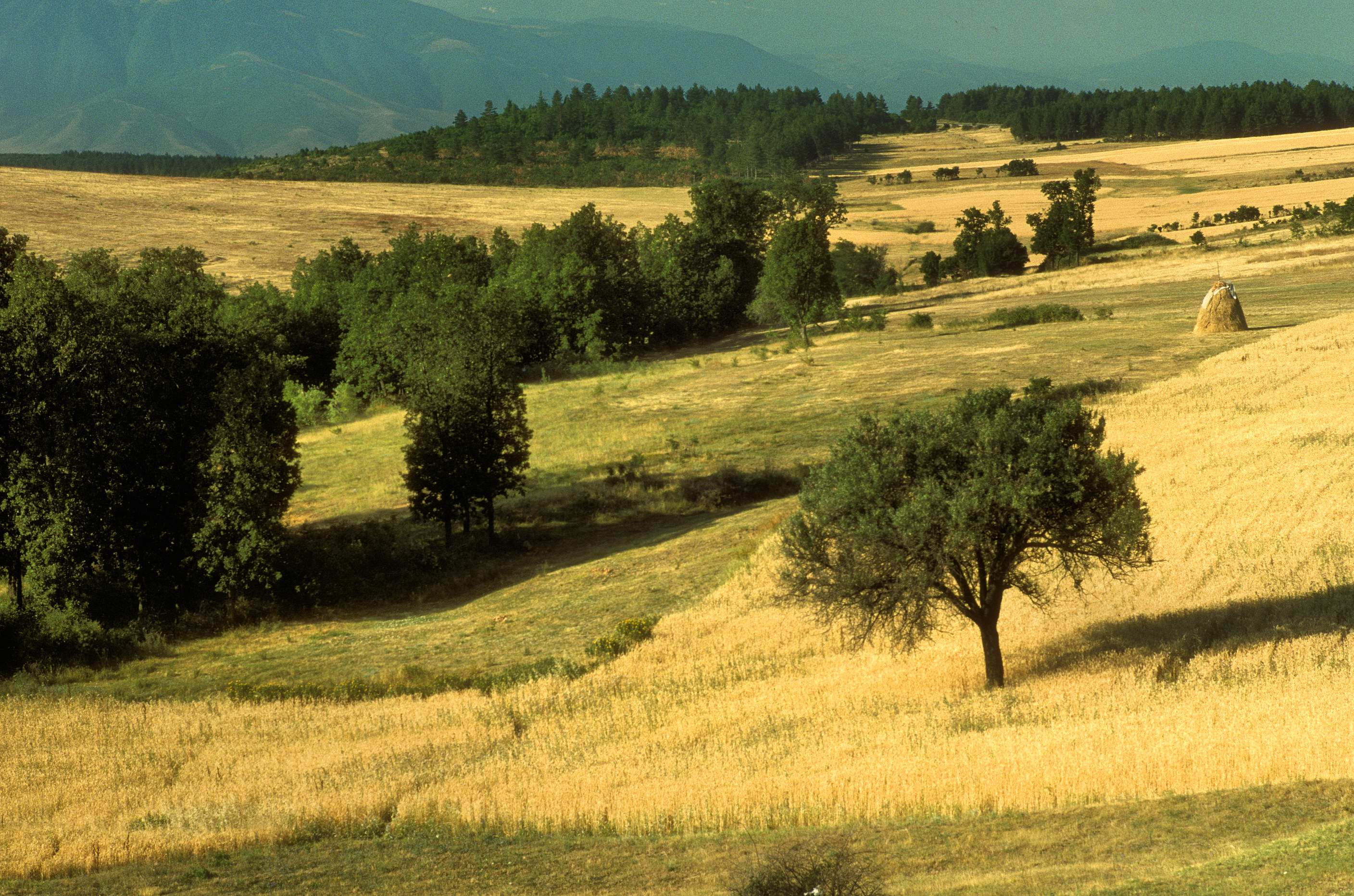 Gorno Sonje